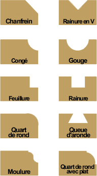 Différents profils réalisés à la défonceuse à bois